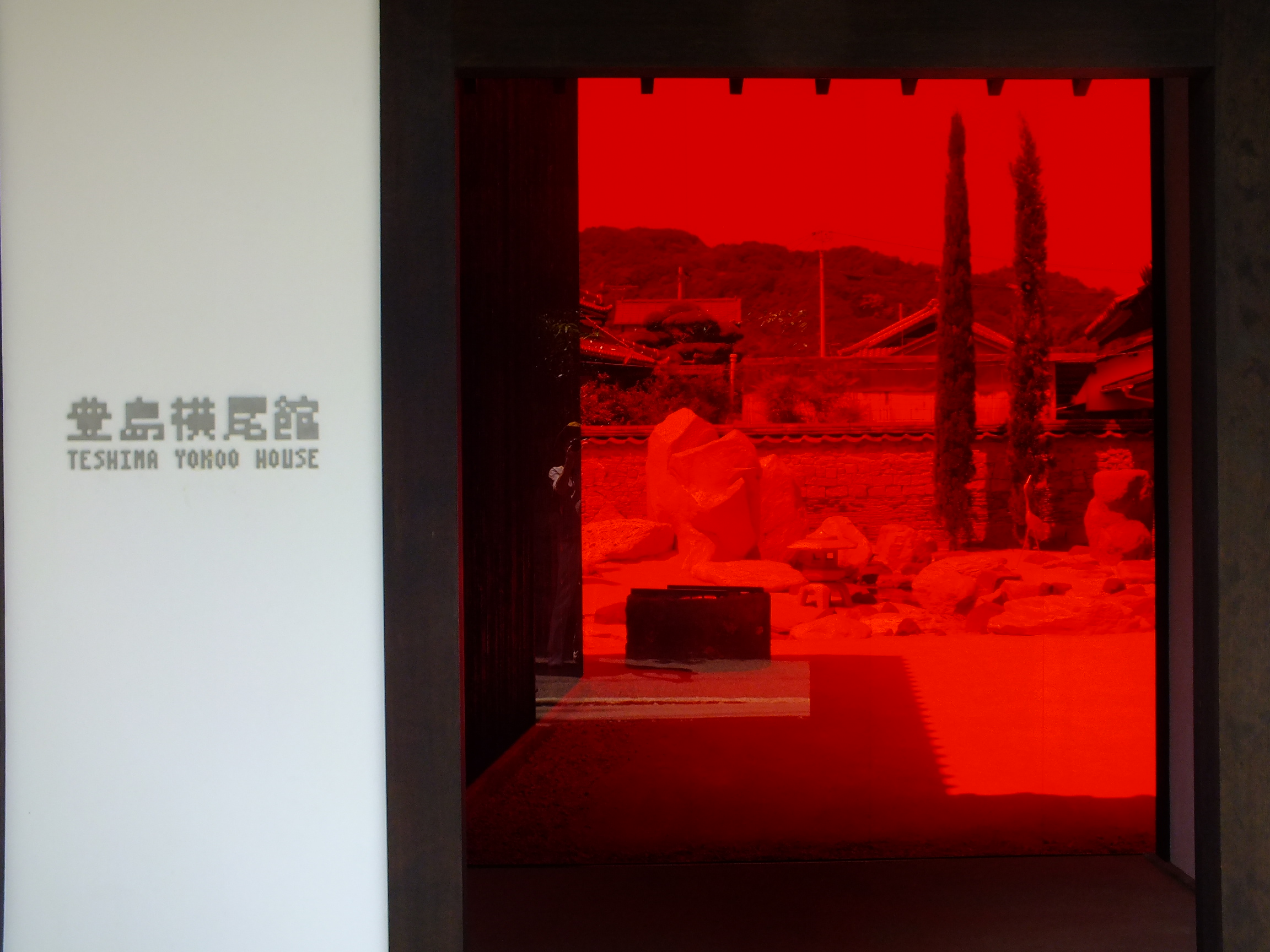 TEL: 0879-68-3555 （豊島美術館）